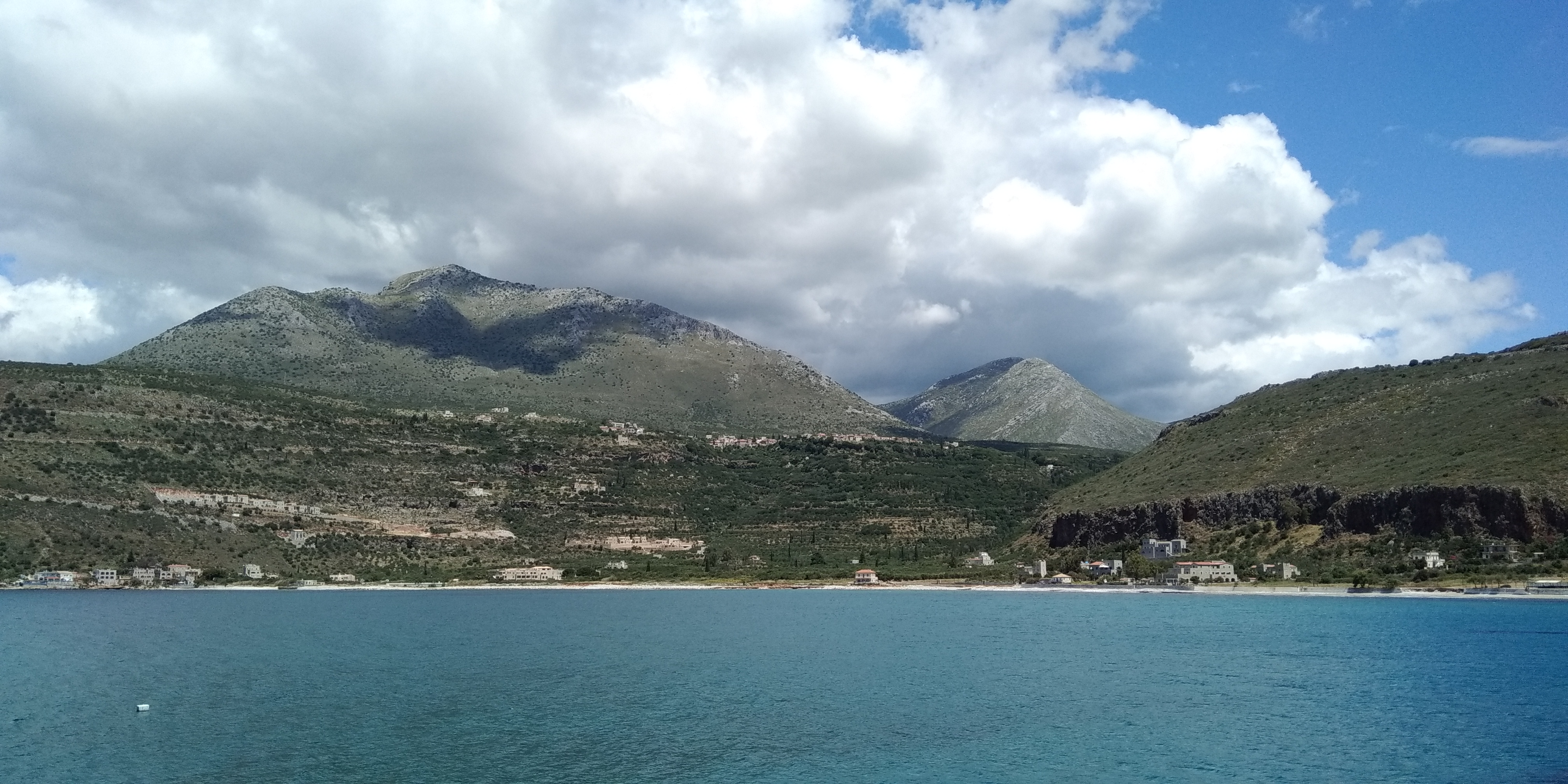 Vue de Karavostasi et Ítylo